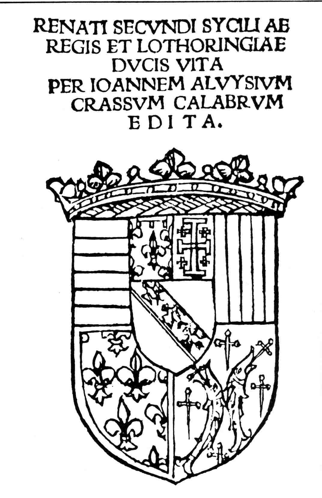 Eloge funébre du duc de Lorraine René II par Jean Loys, imprimé et dédicacé par Matthias Ringmann, Saint-Dié, 1510